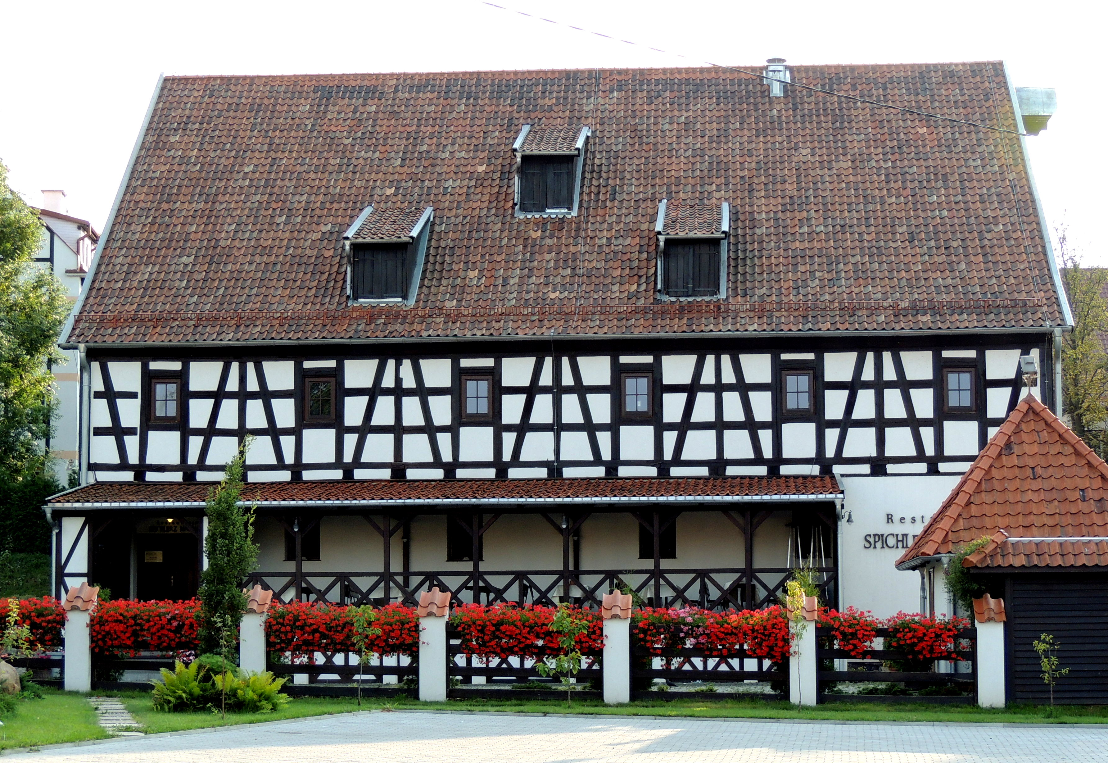 Braniewo, ul. Portowa 5 - spichlerz "Mariacki" (XVII, XVIII, XIX w.), obecnie restauracja